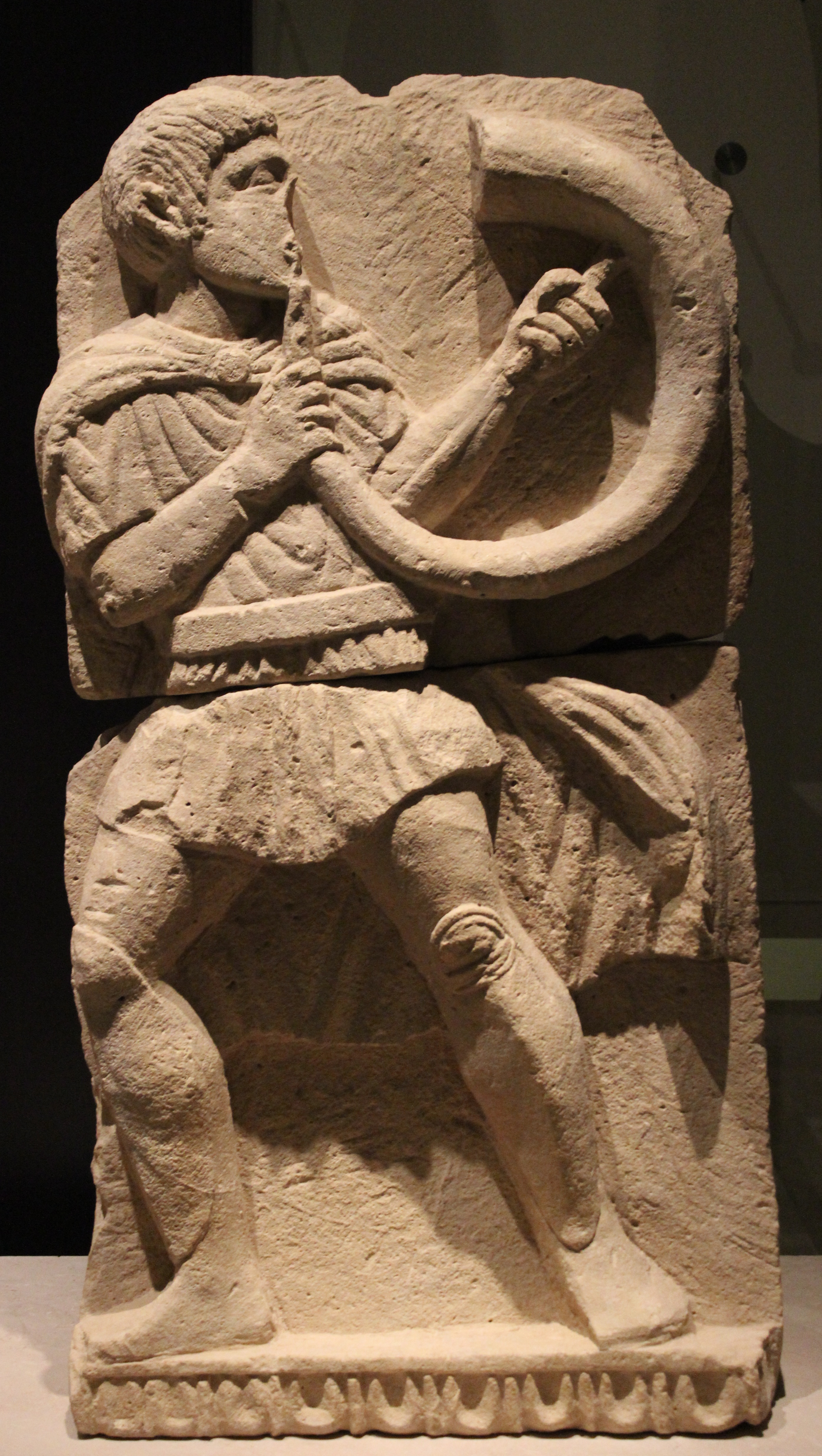 Relieves del Monumento B de Osuna. Madrid, M.A.N.